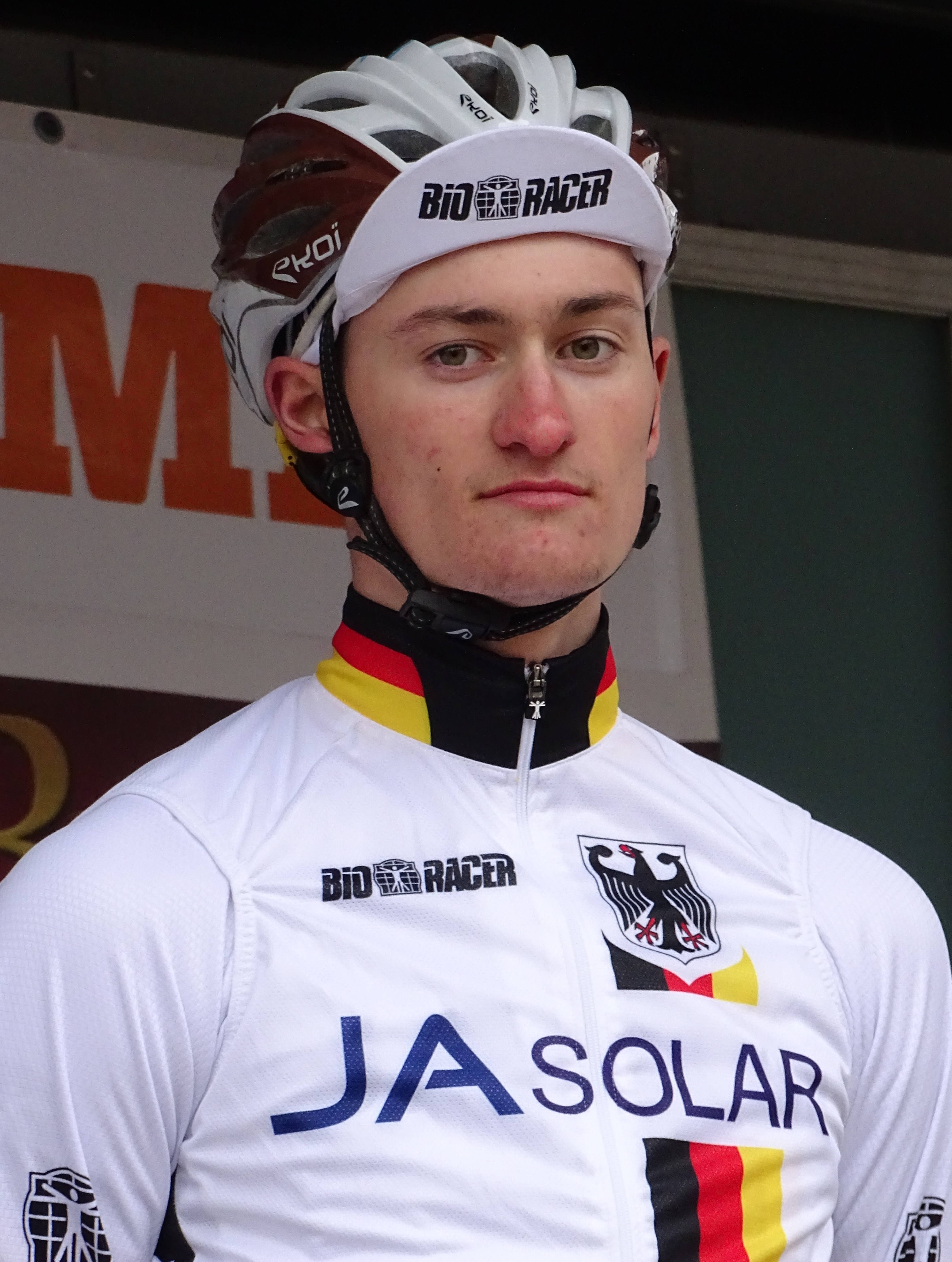 Triptyque des Monts et Châteaux 2015 Depicted person: Nico Denz Depicted team: Équipe nationale d'Allemagne espoirs